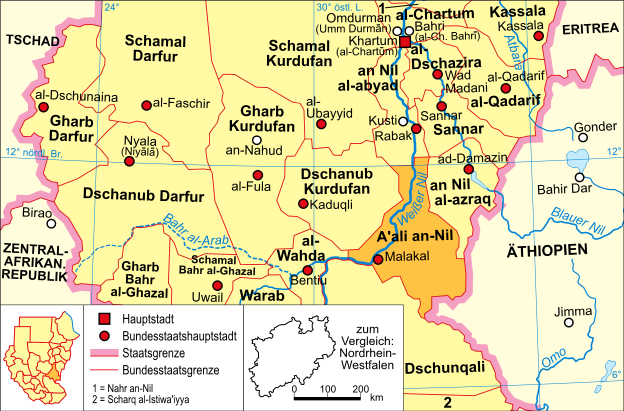 politische Karte des Sudan (Bundesstaat A'ali an-Nil)